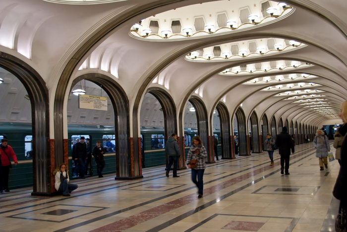 Станция метро «Маяковская» в Москве. 2011 год, декабрь